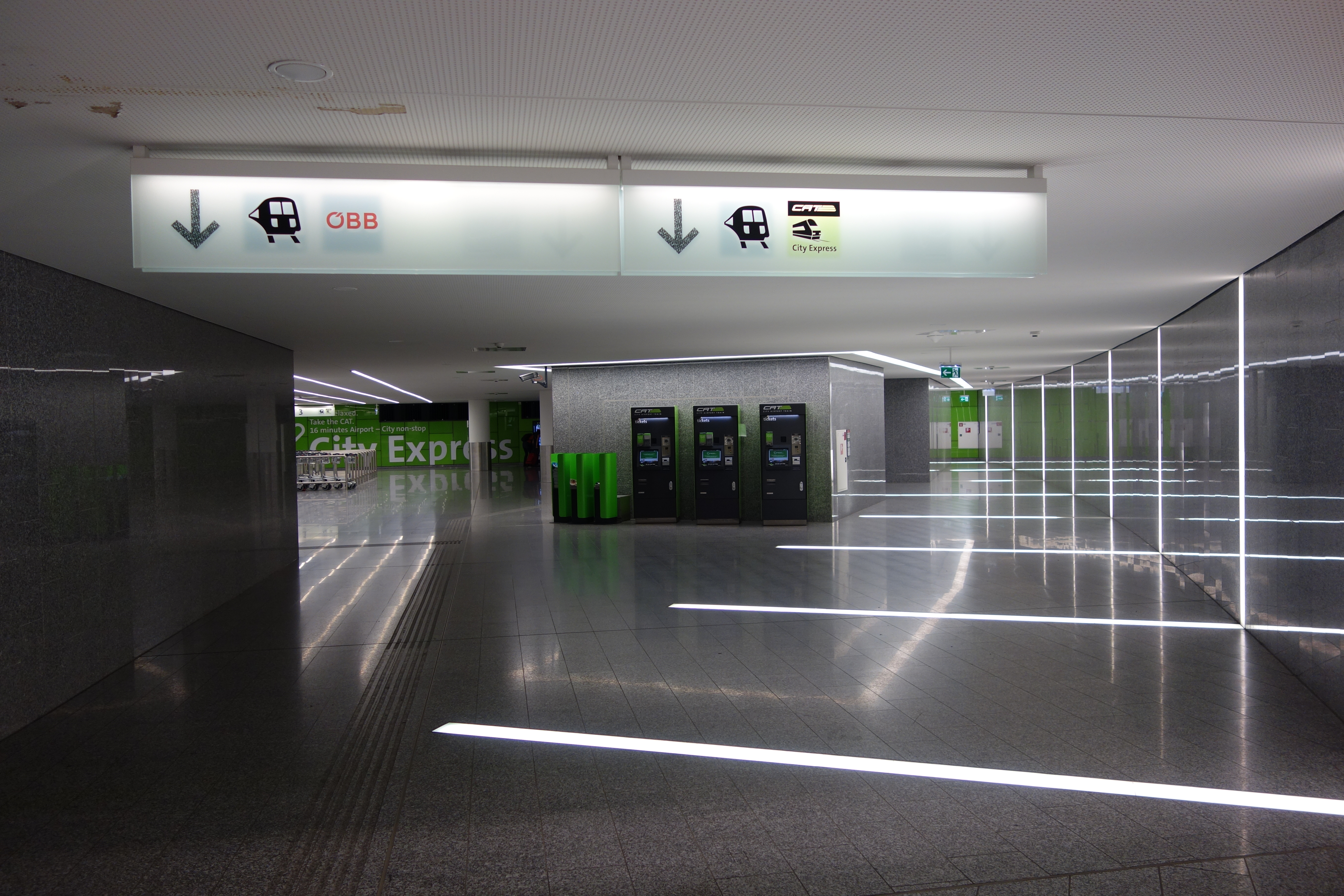 Der östliche Zugang zum Bahnhof Flughafen Wien im Juli 2014.